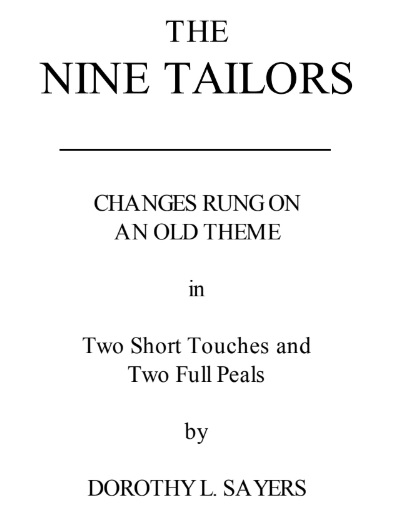 Boktittel, britisk krim med handling lagt rundt John Taylors klokkestøperi